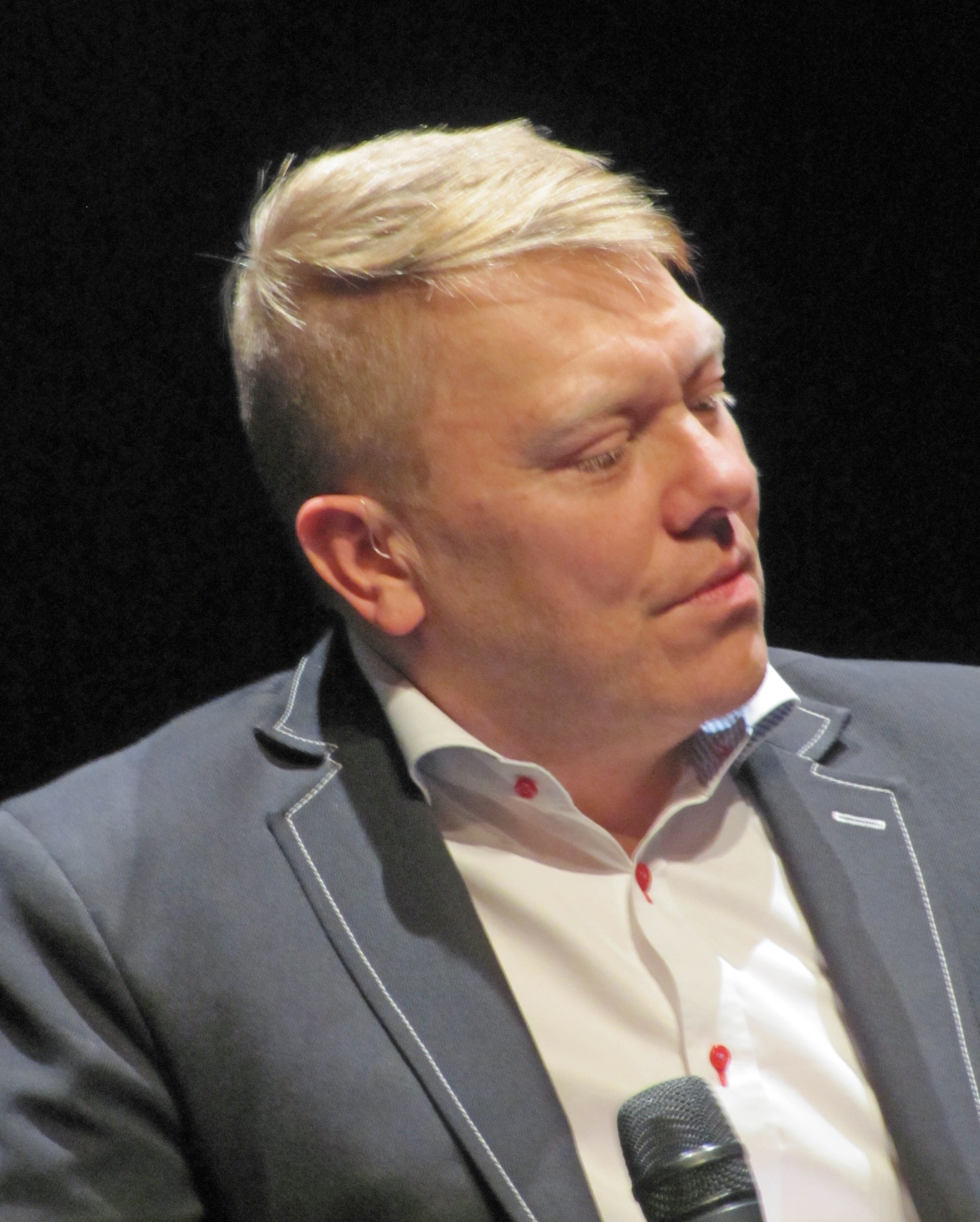 Jón Gnarr, 2011 in Frankfurt am Main.